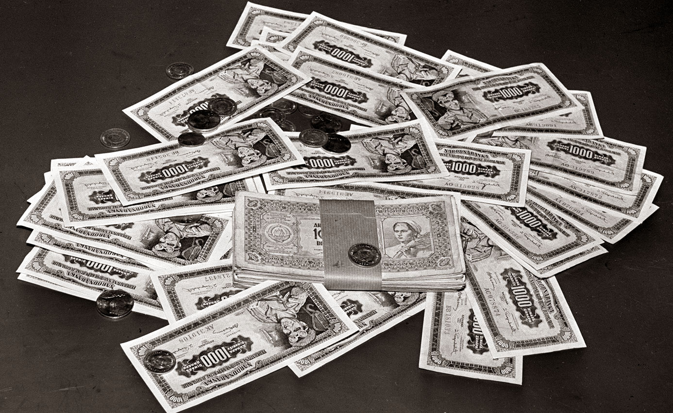 Jugoslovanski dinarji.